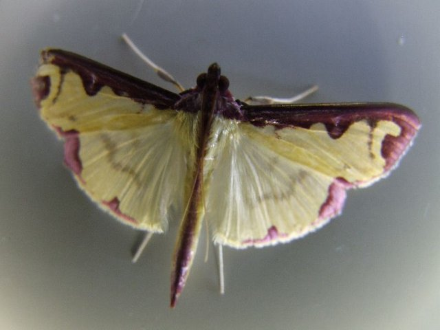 A butterfly (Familia: Crambidae Subfamilia: Spilomelinae Genus: Cadarena, Species: Cadarena sinuata, (Fabricius, 1781) )